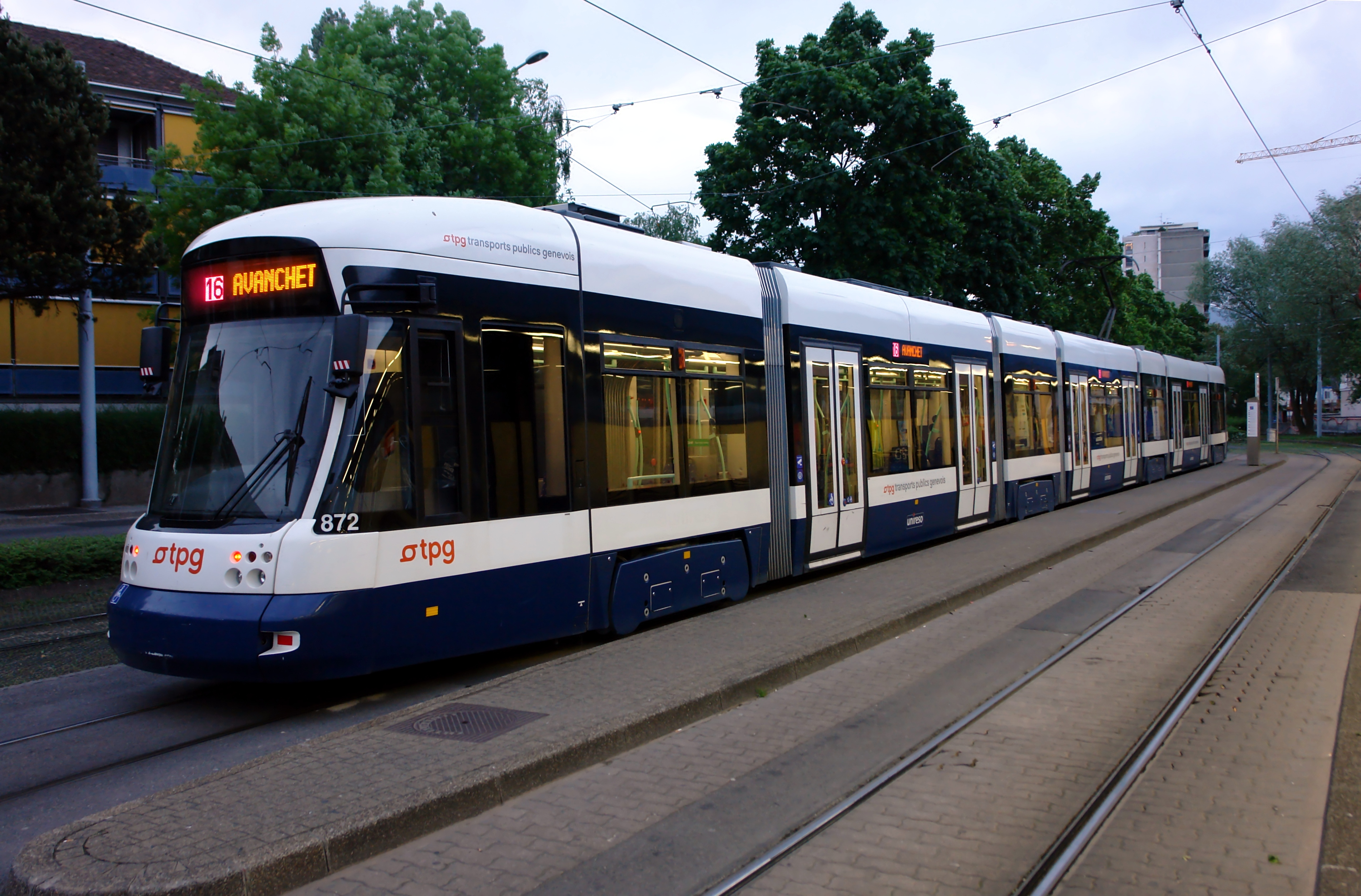 Tramway de Genève, ligne 16, station de Moëllesullaz.